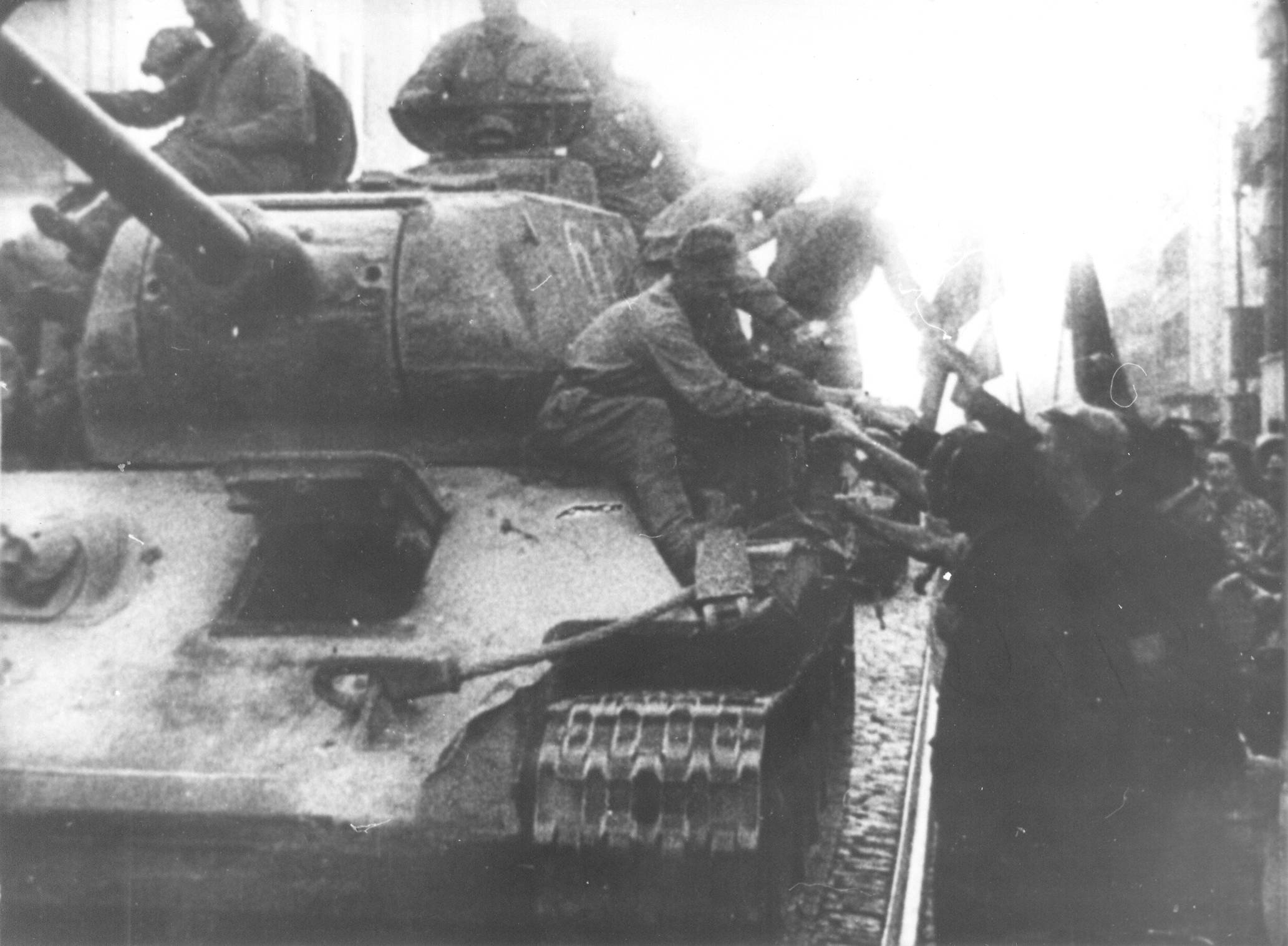 Srpskohrvatski / српскохрватски: Doček crvenoarmejaca na Terazijama 20. oktobra 1944.